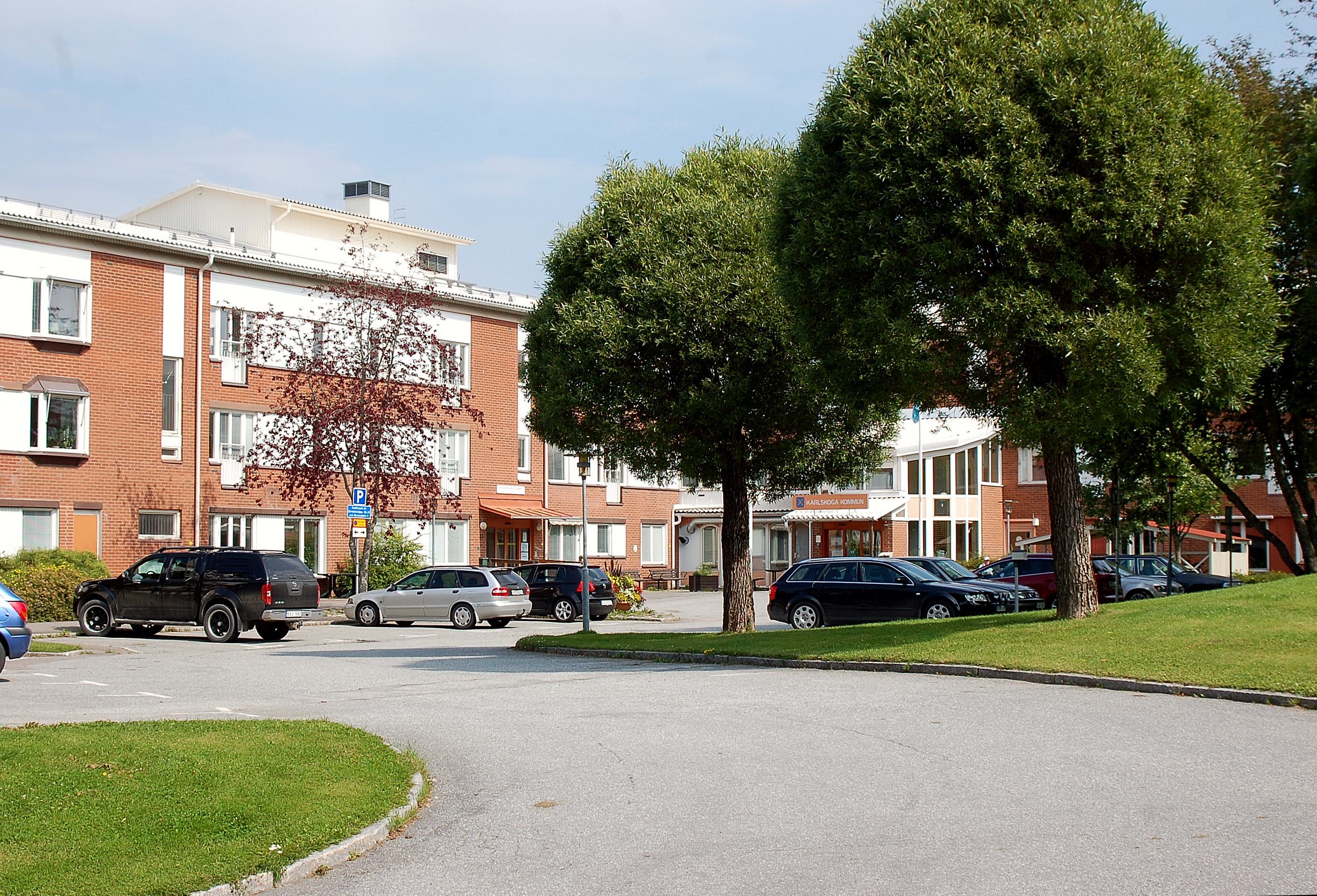 Karlskoga Stadshus, Skrantahöjden, Karlskoga.